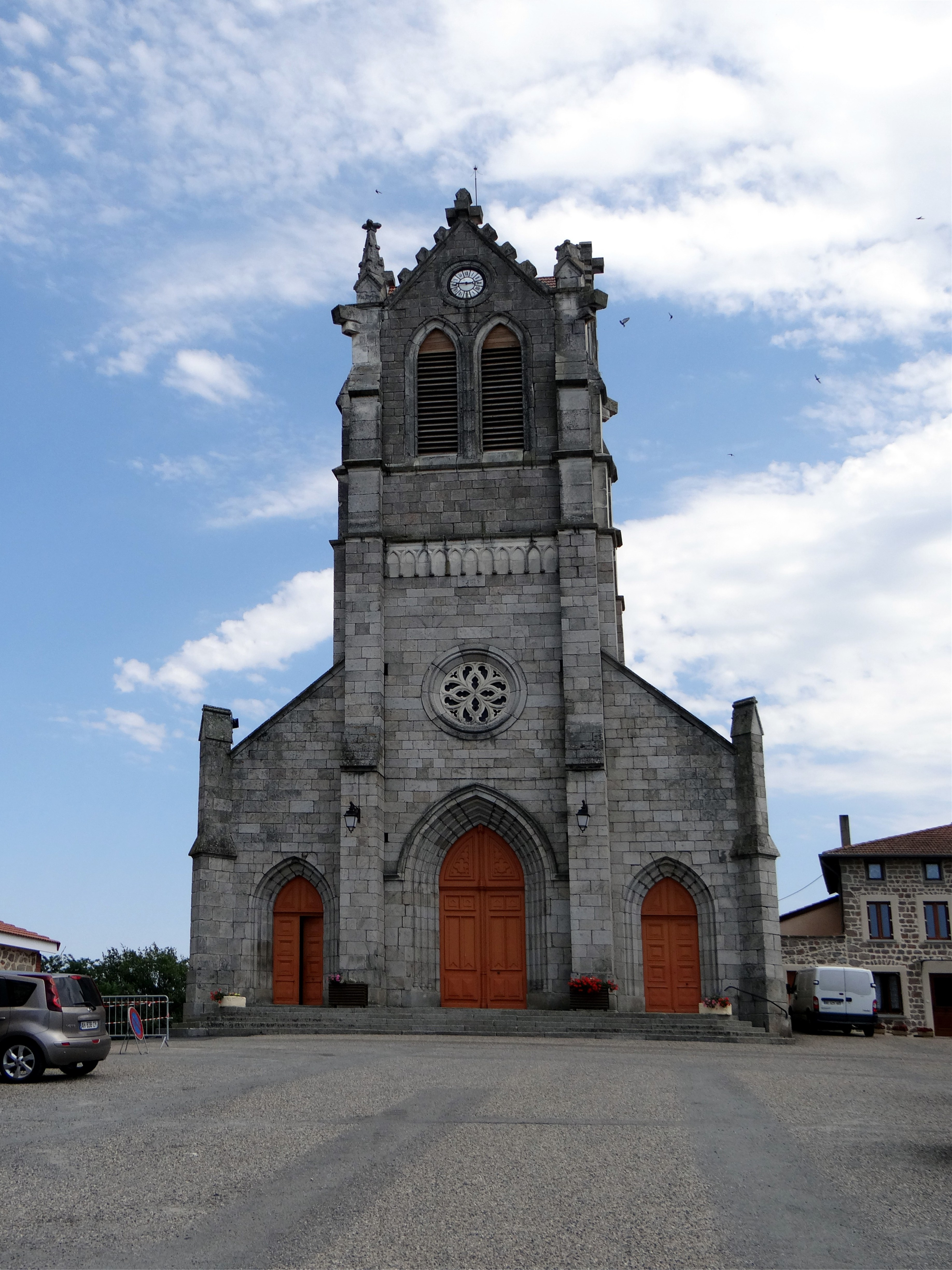 Église Saint Denis, Essertines-en-Donzy, Loire, France.